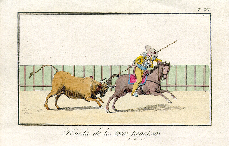 Delgado y Gálvez, José: Tauromaquia o arte de torear á caballo y á pie